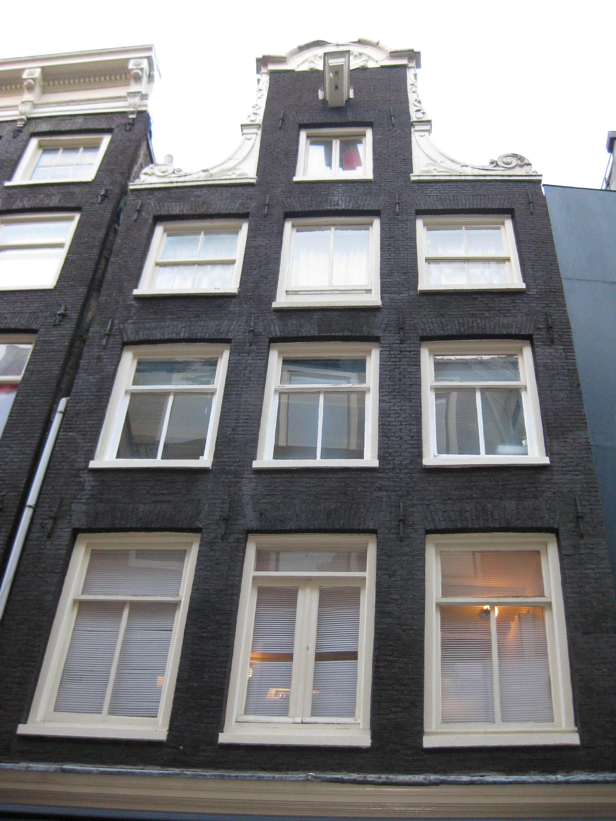 Reguliersdwarsstraat 15, Amsterdam